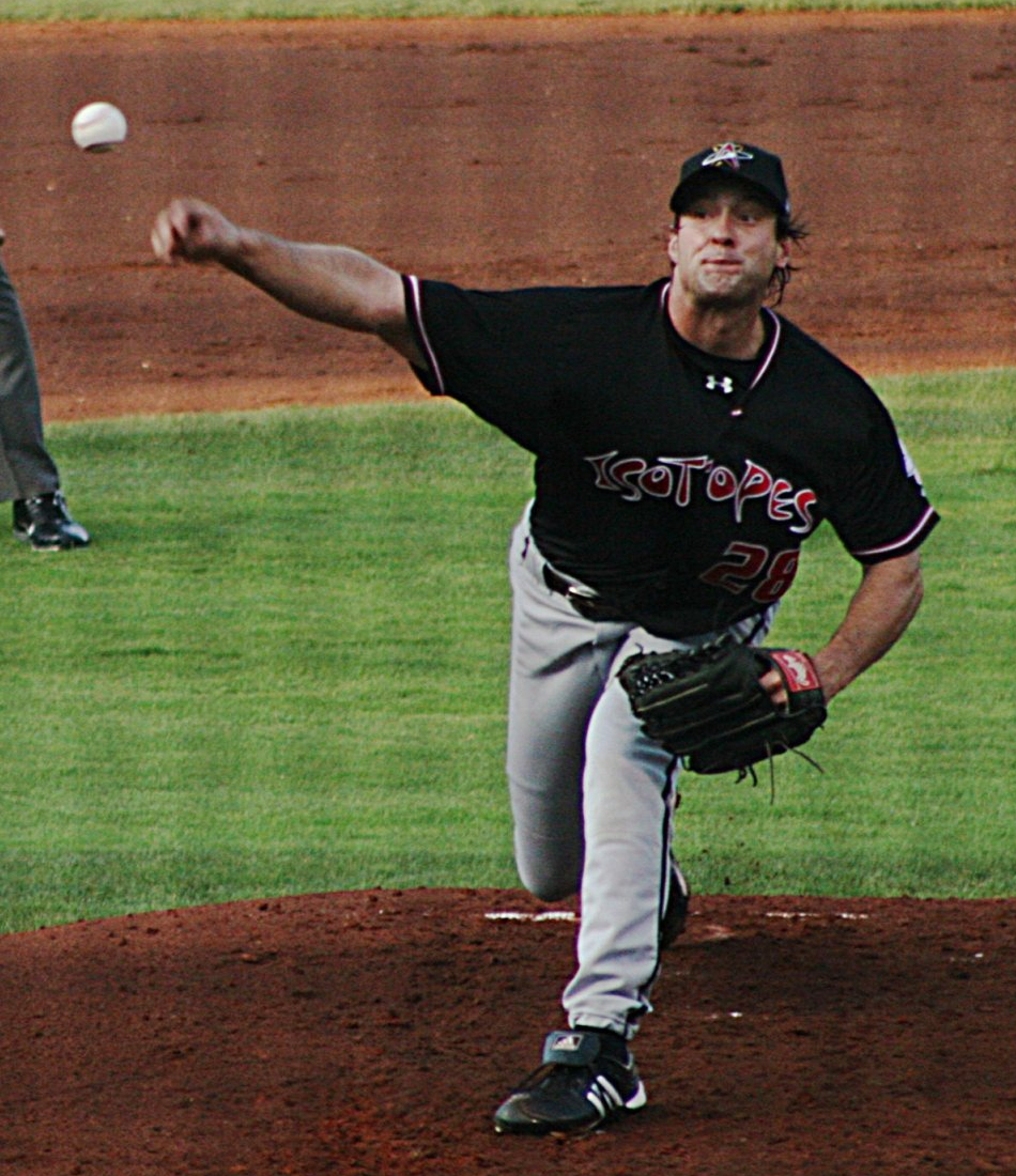 Tim Corcoran